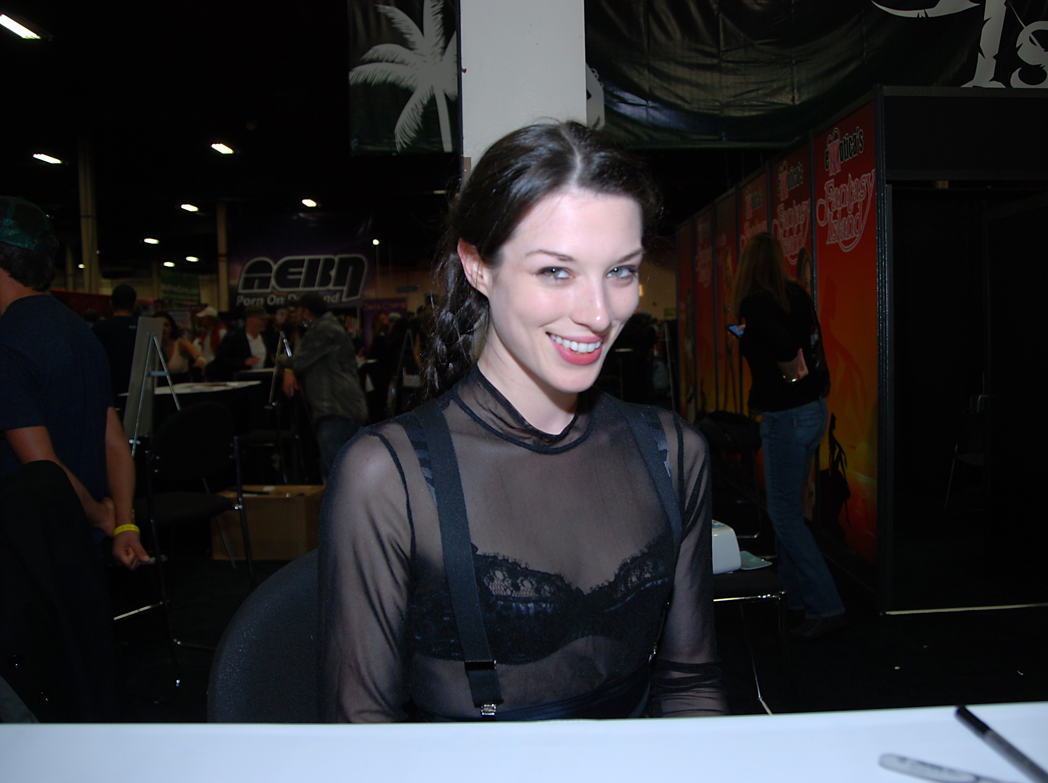 DSC_0720A